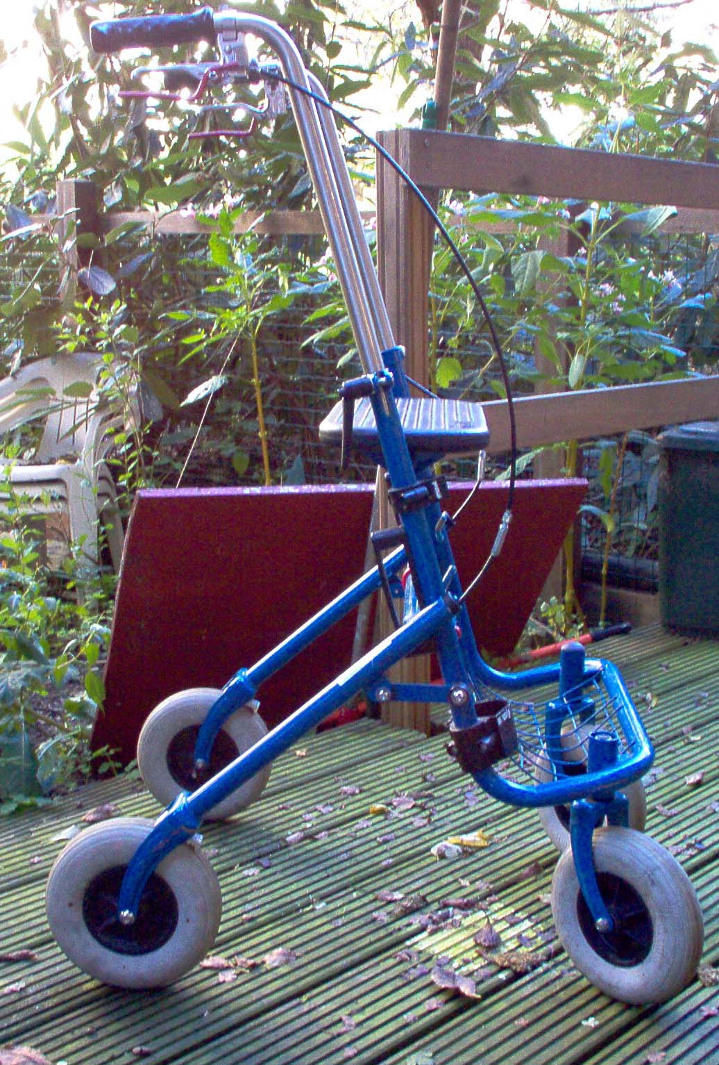 mijn rollator